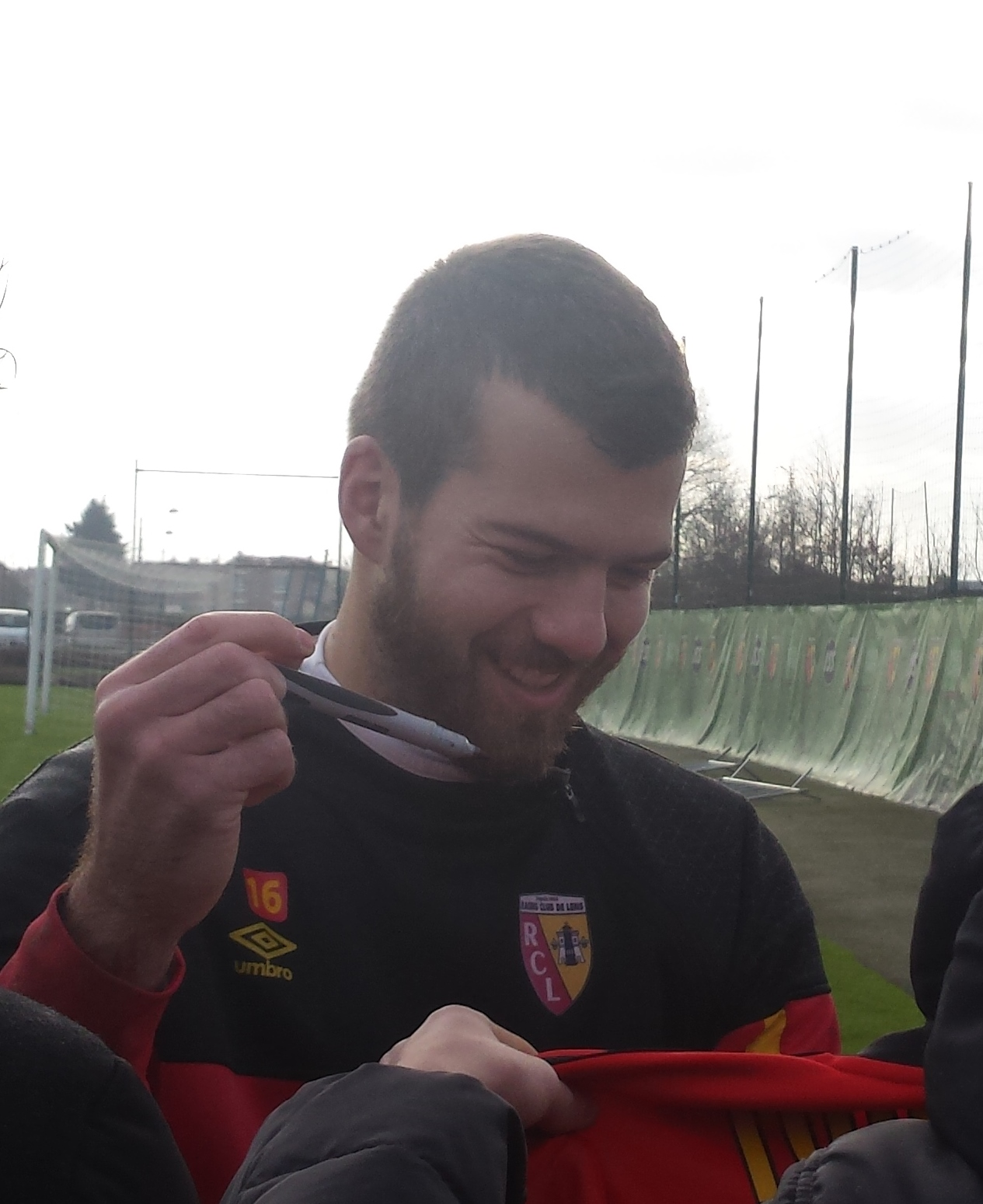 Samuel Atrous après un entraînement public du Racing Club de Lens, le 31 décembre 2014, sur le terrain "San Siro" du Centre Technique et Sportif de La Gaillette.